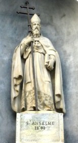 San Anselmo